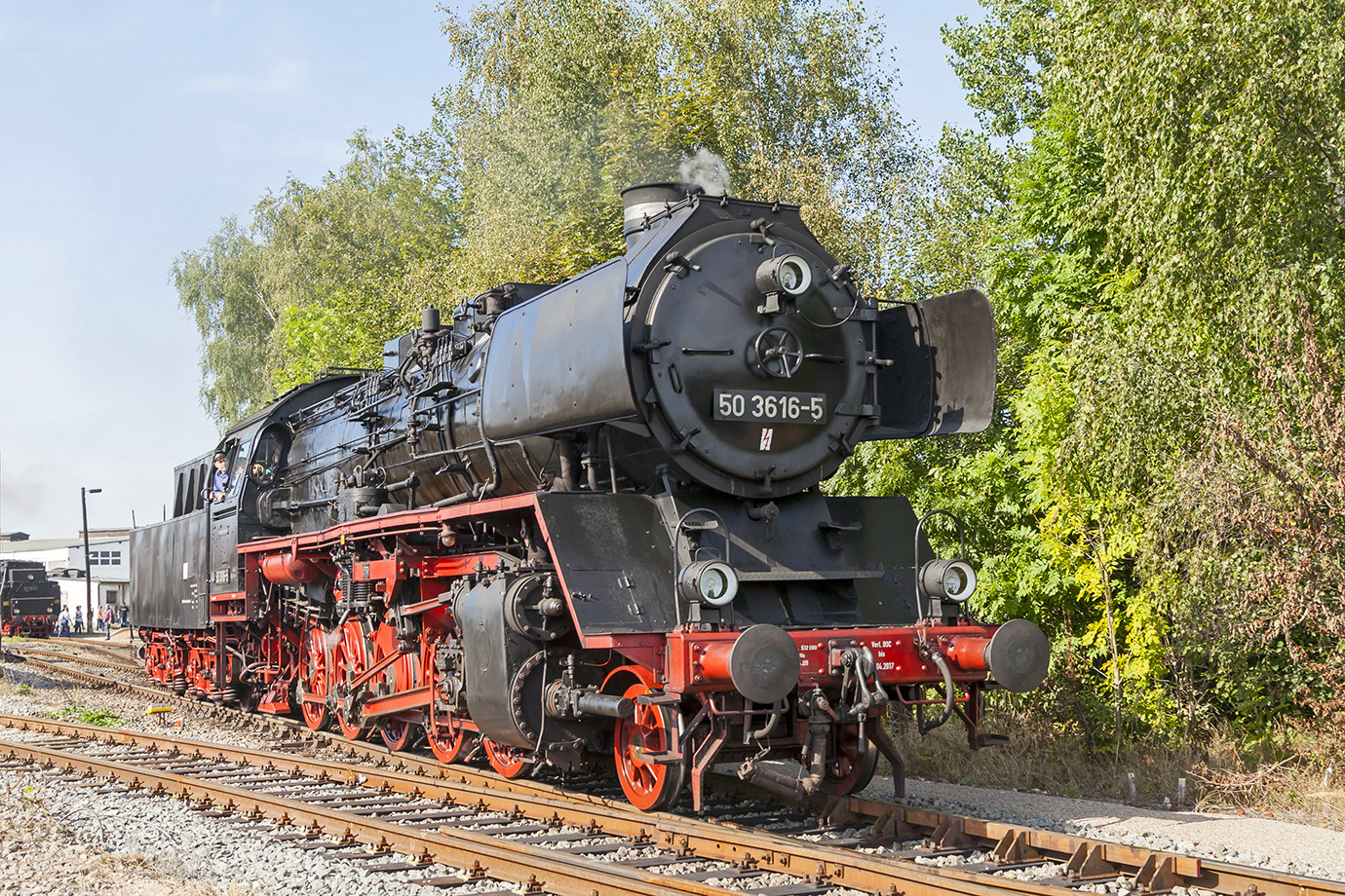 Построен как BR 50 453 заводом Schichau в Ельбинге. В 1960 г. прошёл реконструкцию на паровозоремонтном заводе RAW Stendal, обозначен BR 50 3616 (c 1971 г. 50 3616-5). Работал в следующих депо: Stendal c 02.08.60 по 24.06.62 Halberstadt с 06.07.62 по 09.10.69 Roßlau с 10.10.69 по 11.03.70 Stendal с 12.03.70 по 05.11.70 Haldensleben с 06.11.70 по 21.10.73 Roßlau с 01.12.73 по 21.11.77 Pasewalk с 22.11.77 по 24.10.78 отставлен в запас Hilbersdorf с 25.10.78 по 12.03.81 Dresden с 13.03.81 по 15.03.84 Hilbersdorf с 16.03.84 по 11.04.86 Glauchau с 12.04.86 по 26.03.87 Dresden с 27.03.87 по 08.04.87 Hilbersdorf с 09.04.87 по 24.12.91 c 25.12.1991 отставлен от работы и отправлен на хранение Списан 20.03.1992. 01.01.1993 передан железнодорожному музею VSE Schwarzenberg